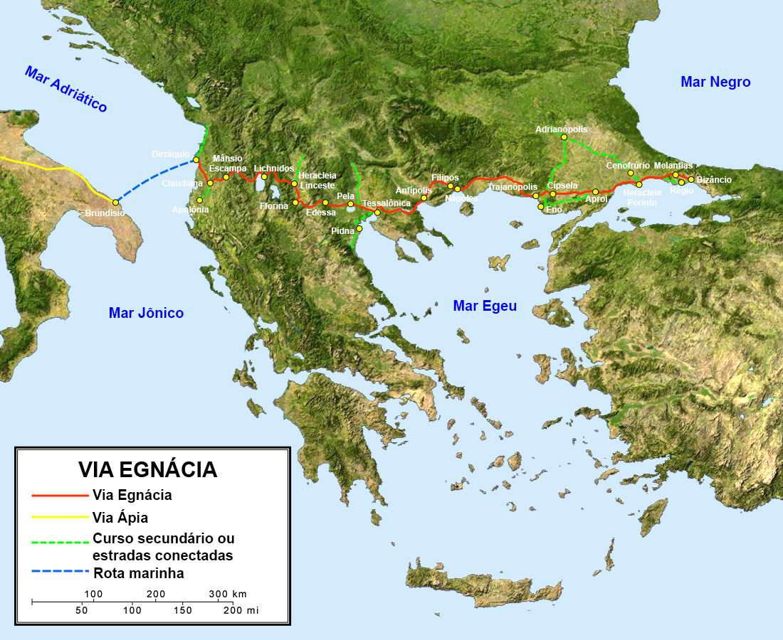 Mapa da Via Egnácia